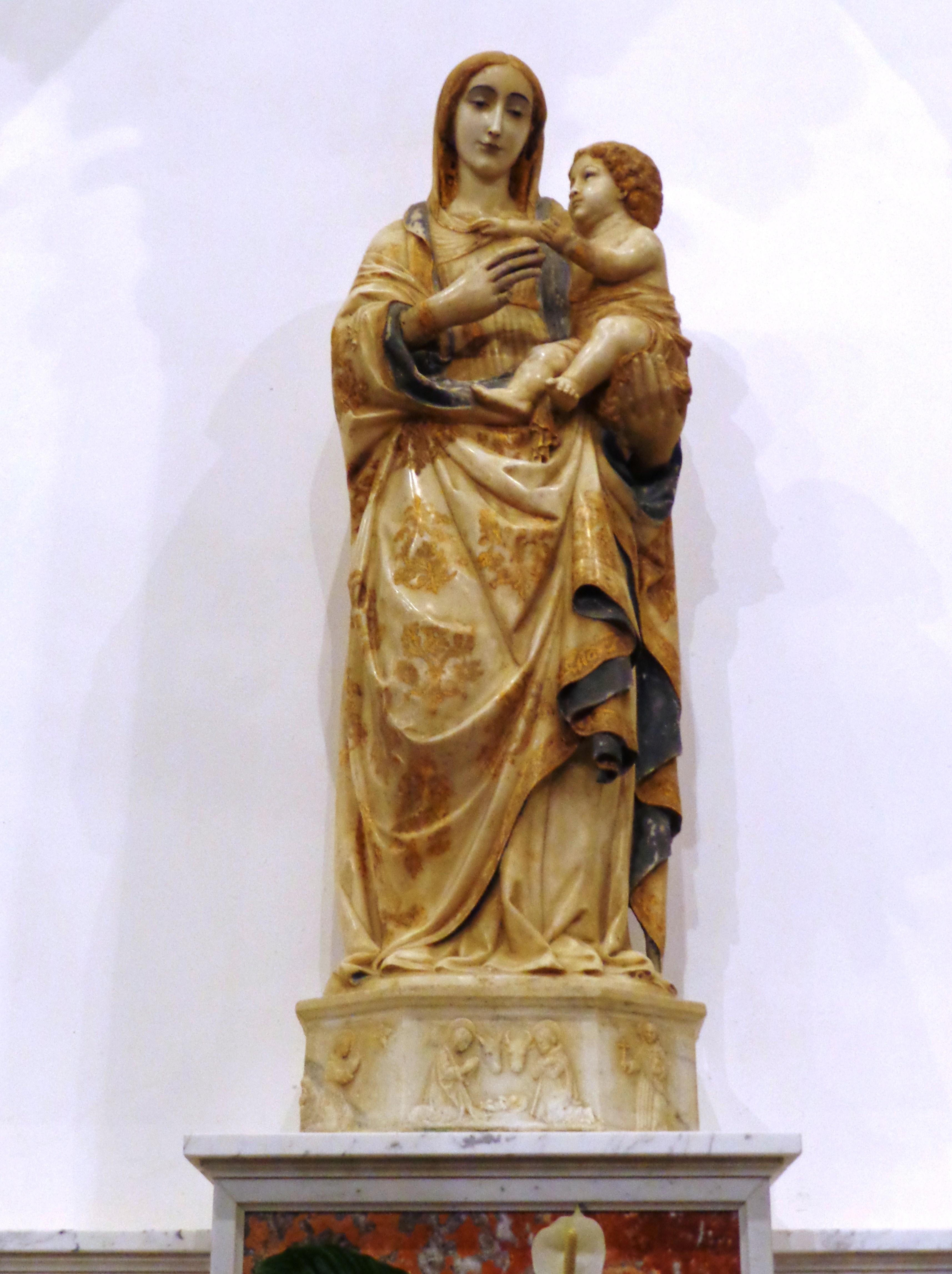 Madonna Gagini Duomo